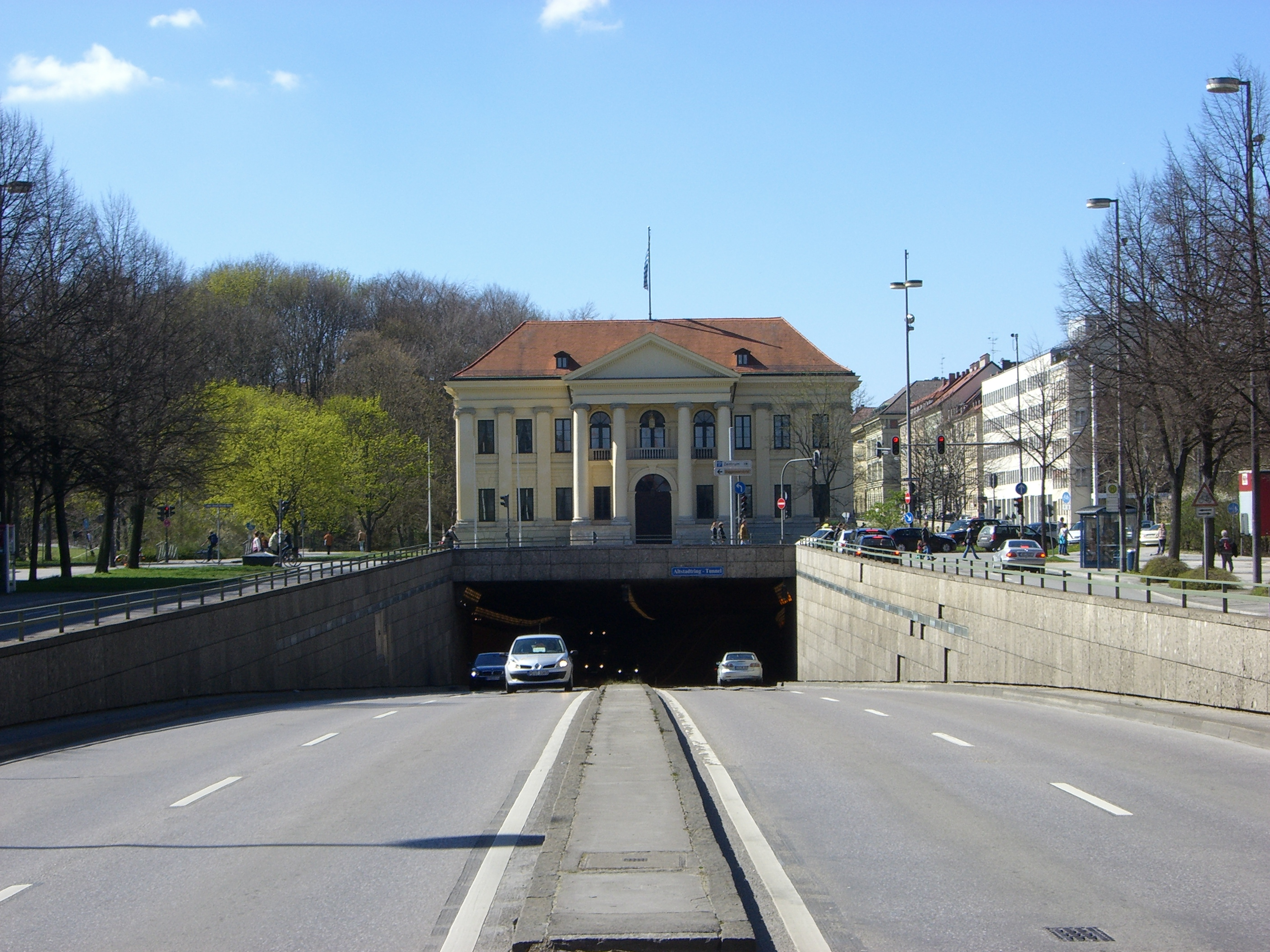 München: Altstadtring (Altstadtringtunnel in der Prinzregentenstr. mit Prinz-Carl-Palais im Hintergrund)